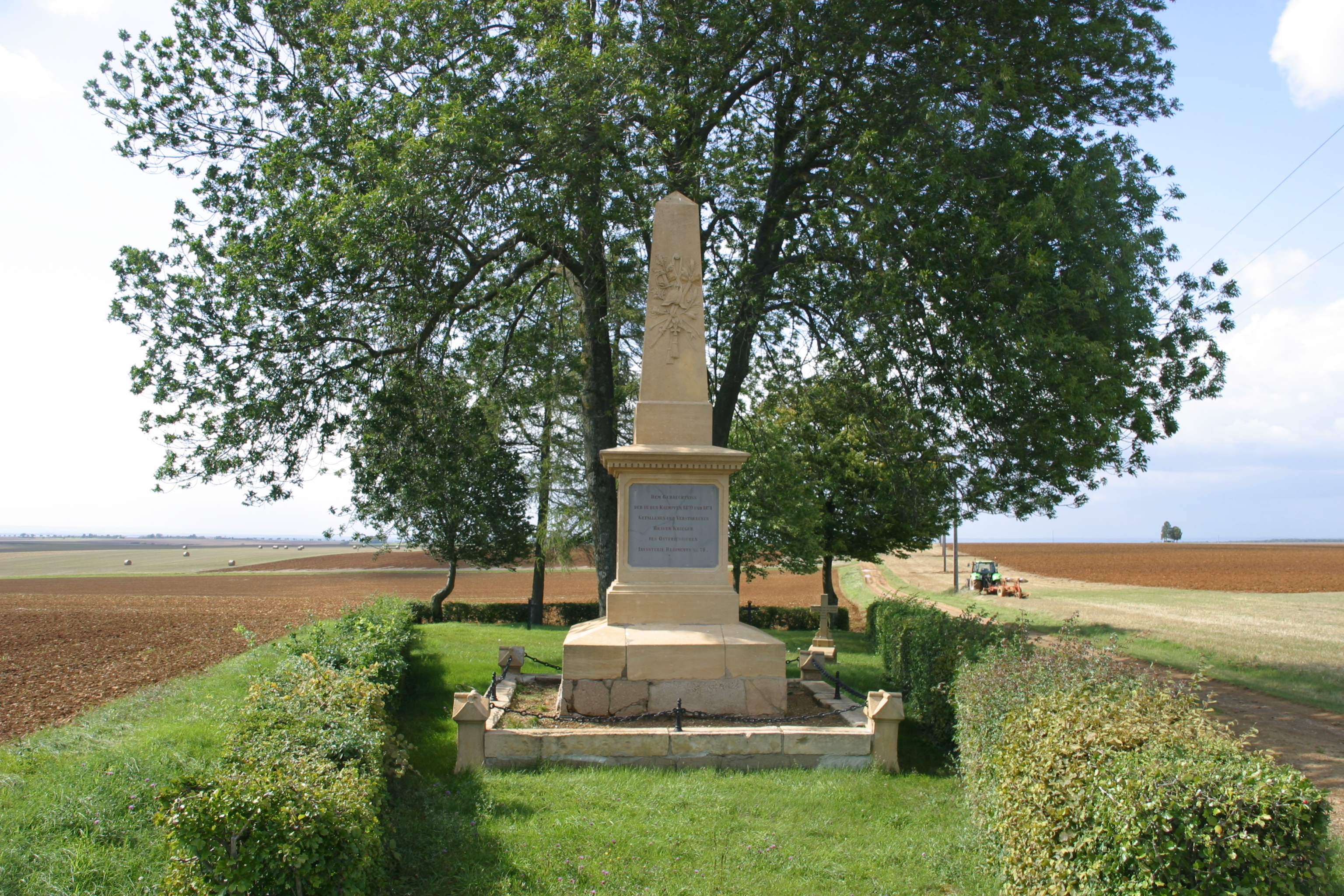 Gedenkstein südlich von Vionville